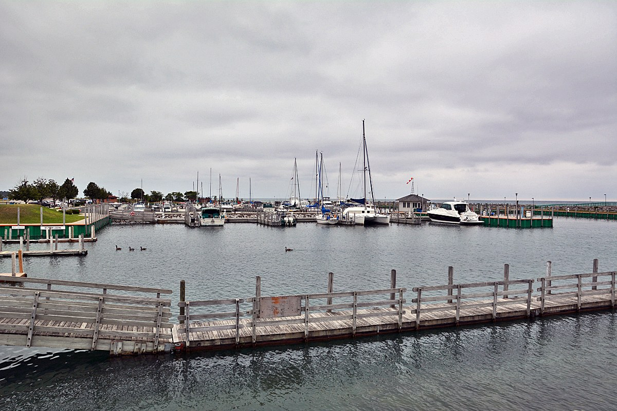 Rogers City, Michigan (Harbor)